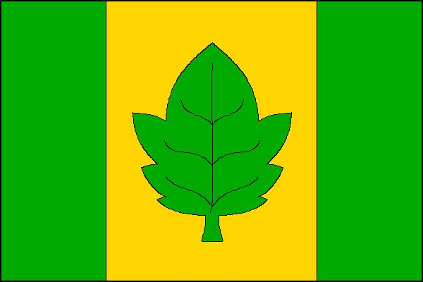 Vlajka Města Albrechtic